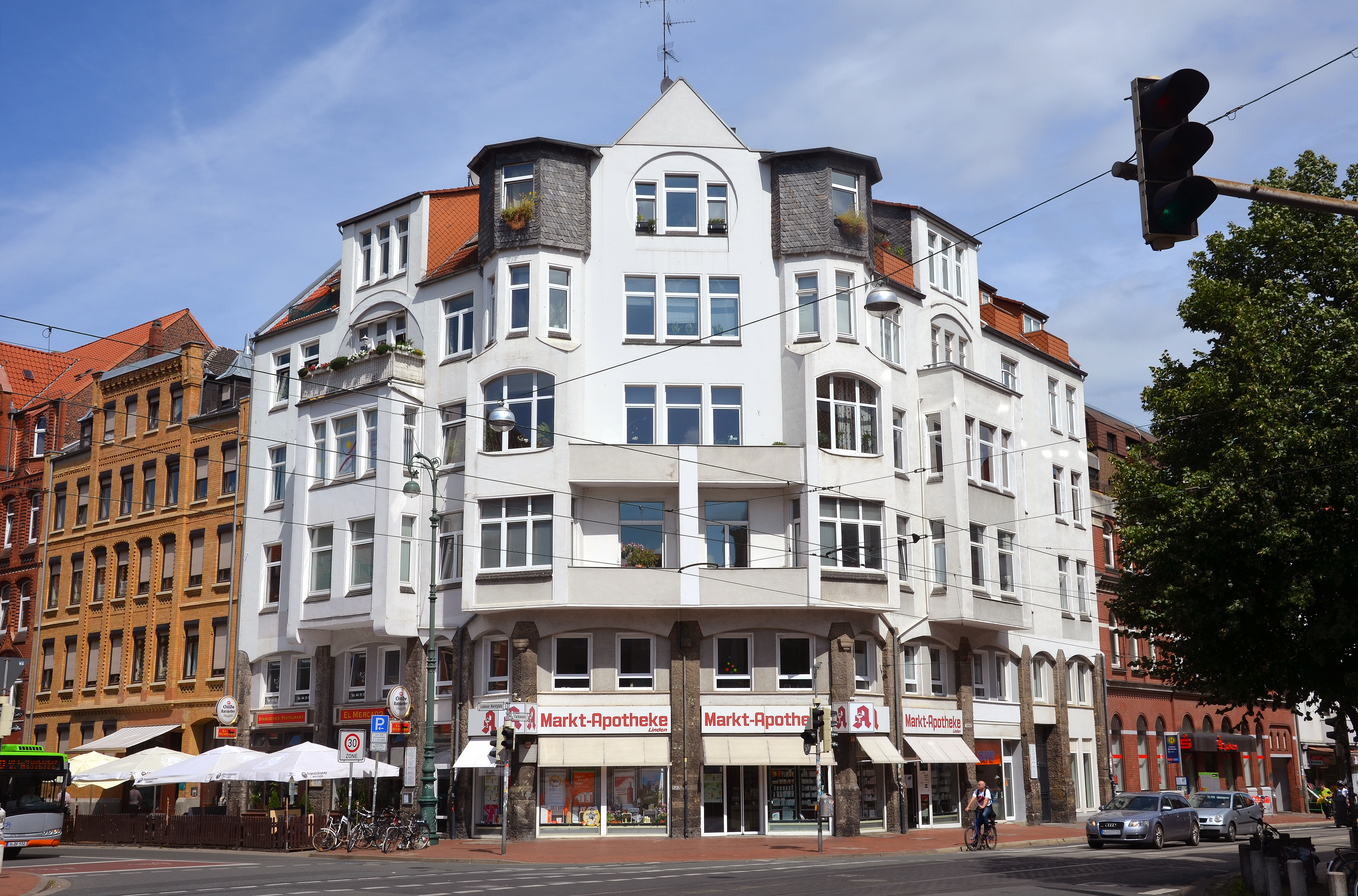 Blick vom Fußgängerüberweg an der Posthornstraße auf das Geburtshaus der deutsch-jüdischen Historikerin und politischen Philosophin Hannah Arendt am Lindener Marktplatz 2 Ecke Falkenstraße in Hannover, Stadtteil Linden-Mitte